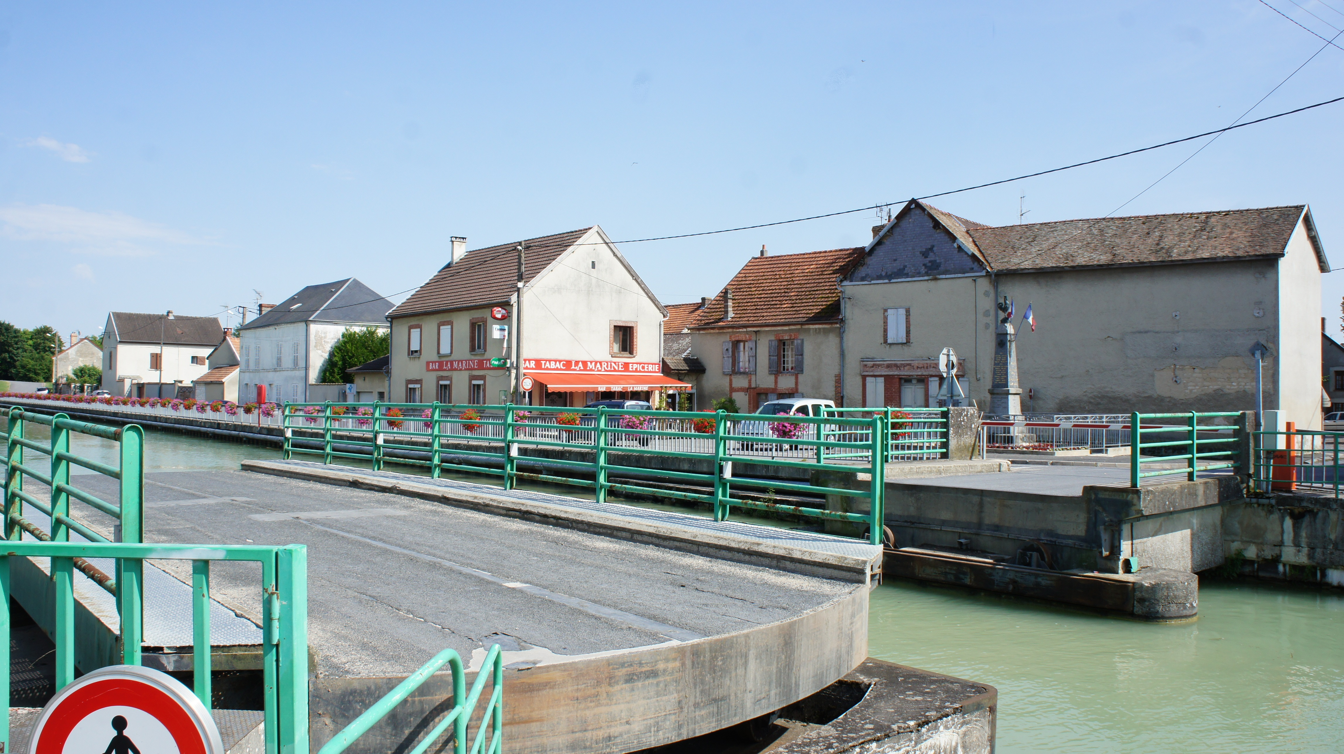 à Bisseuil .